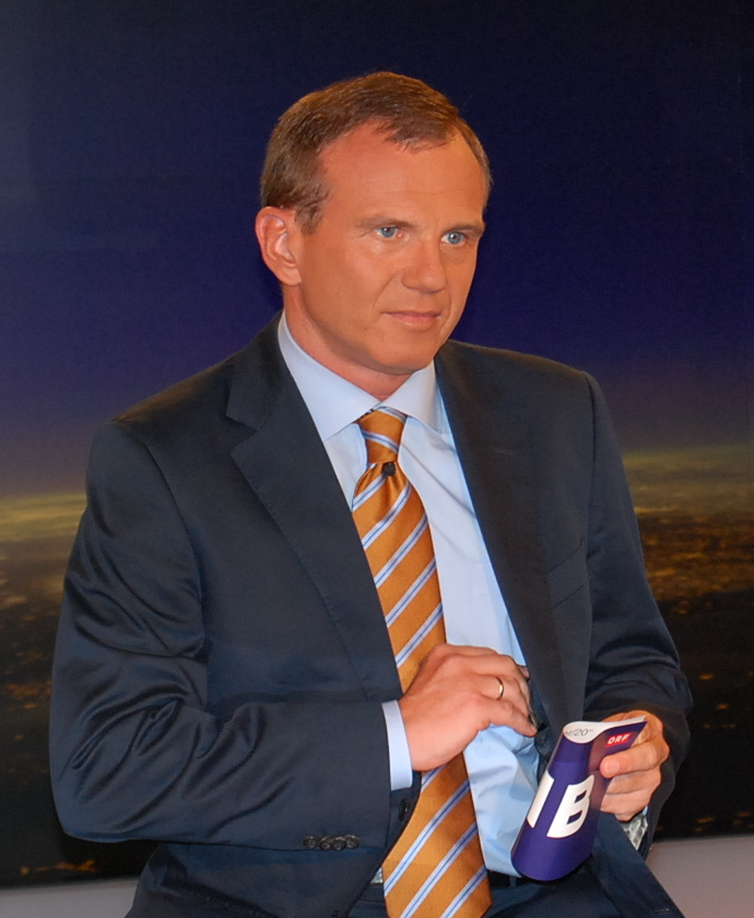 Armin Wolf im ZIB 2 Studio